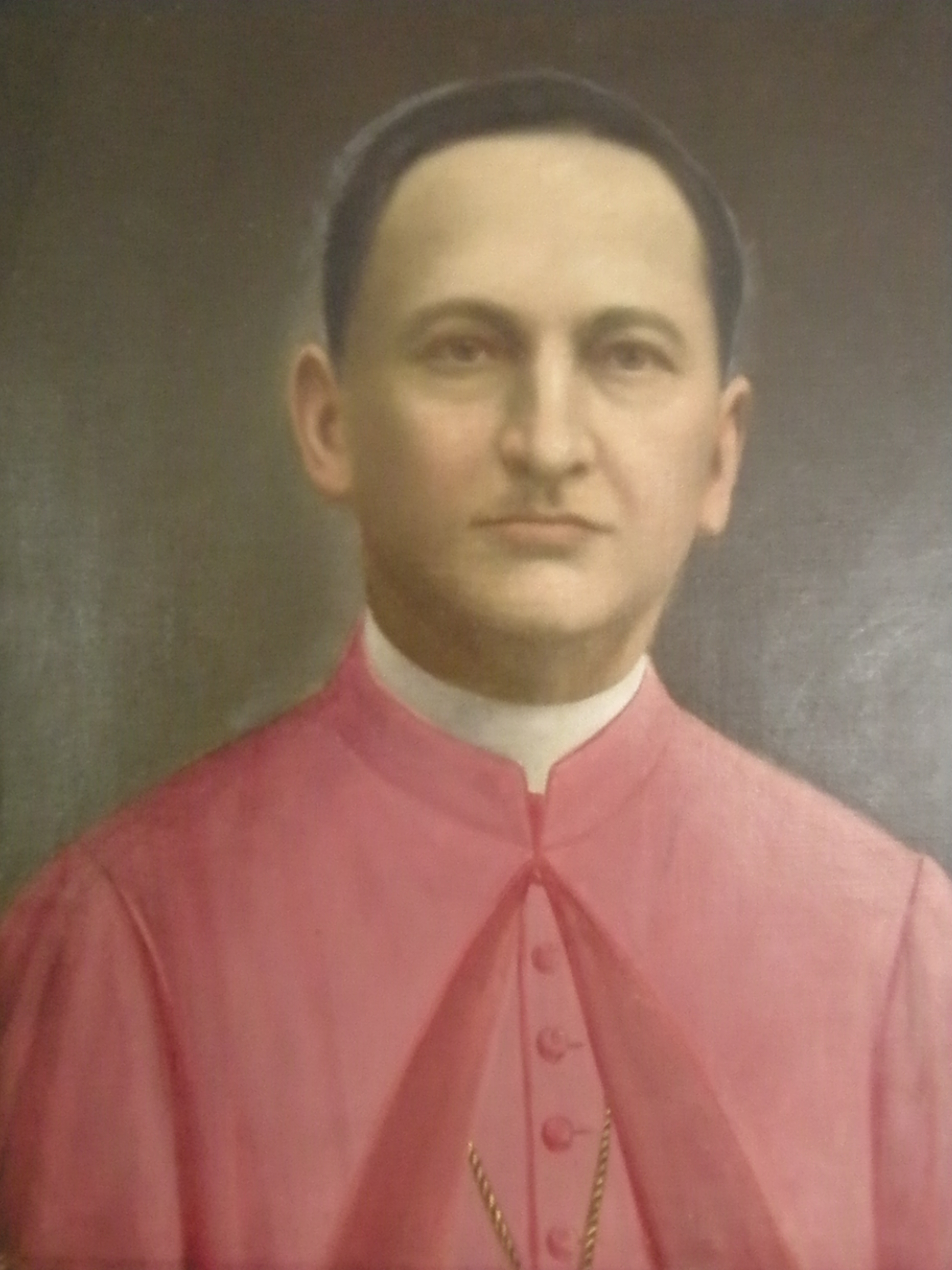 Olejomalba Augustin Fibiger